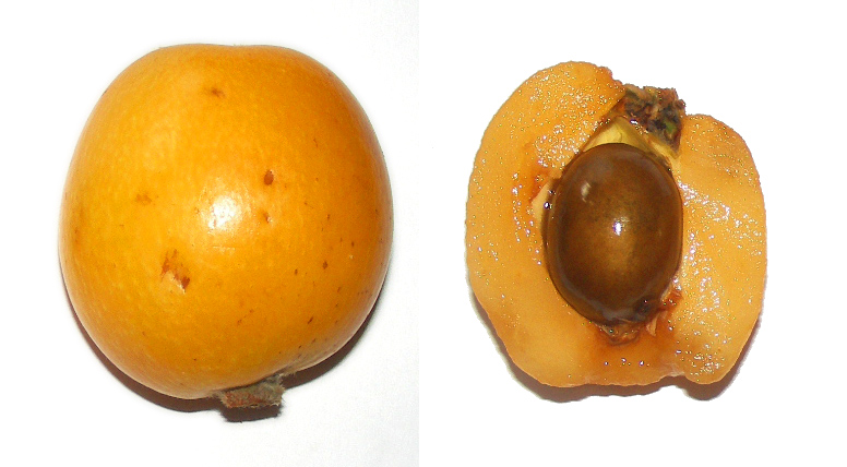 Dos nísperos, Eriobotrya japonica, de mercado: uno entero y otro pelado, partido, con hueso y sin rabo.